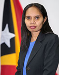 Maria Angelina Lopes Sarmento, Abgeordnete des Nationalparlaments Osttimors